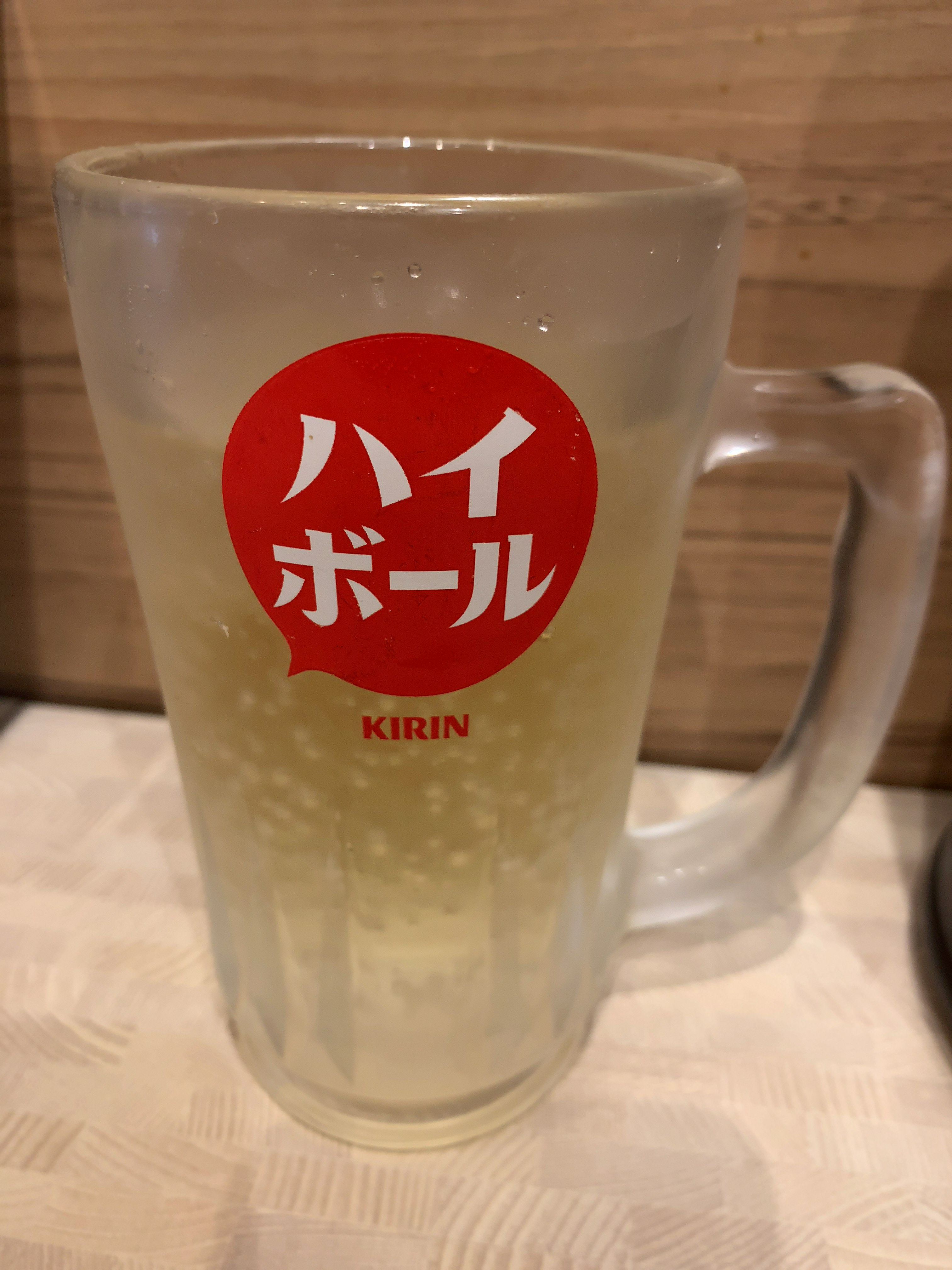 うま辛炒飯、餃子、ハイボール 中華食堂 一番館 吉祥寺北口駅前店 0422-22-0127 東京都武蔵野市吉祥寺本町1-1-3 1F・2F